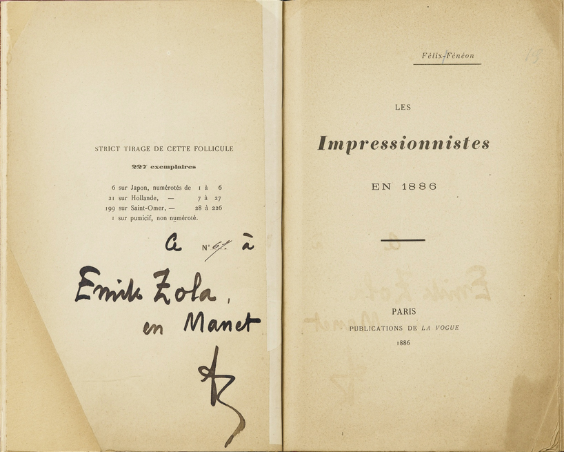 Page de faux titre et envoi à Emile Zola de l'édition originale.